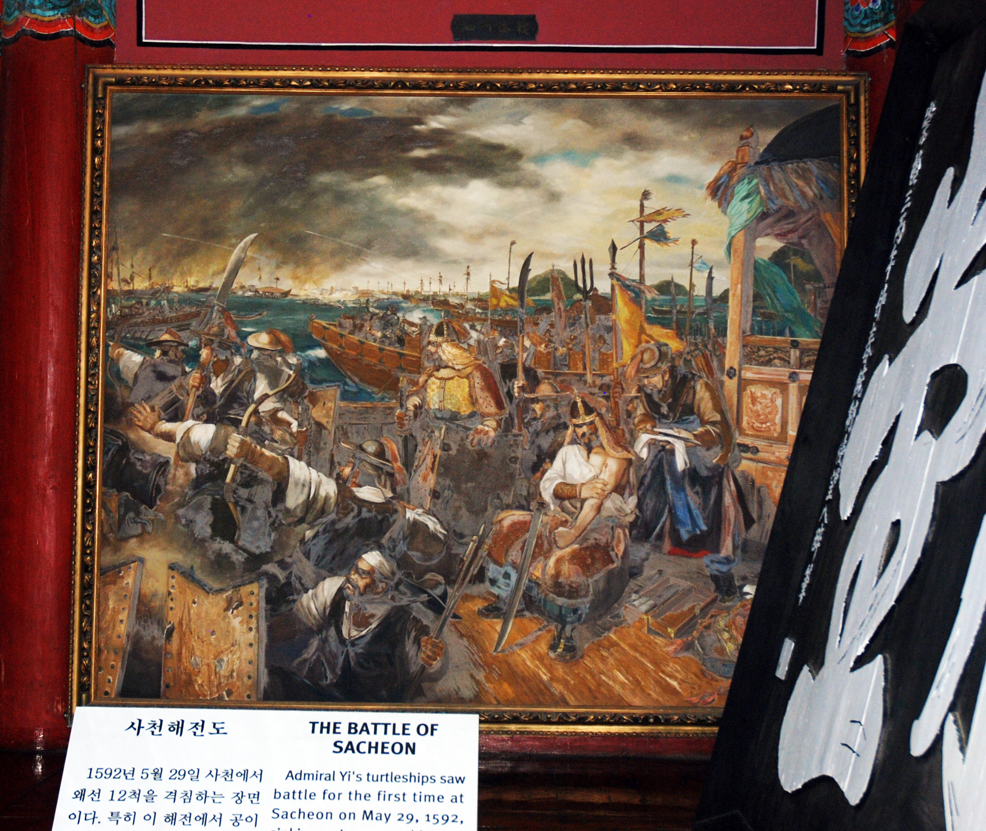 Раненый Ли Сунсин в битве при Сачхоне